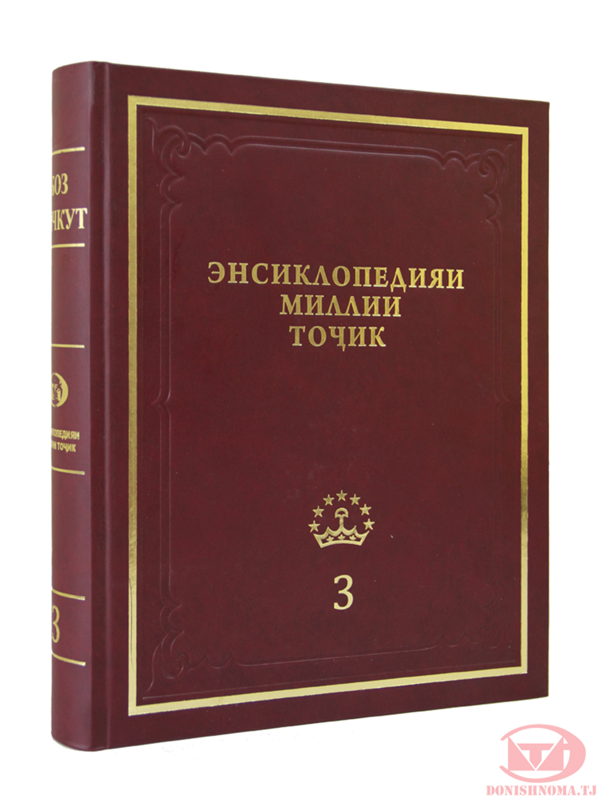 Тоҷикӣ: Энсиклопедияи Миллии Тоҷик. Ҷилди 3